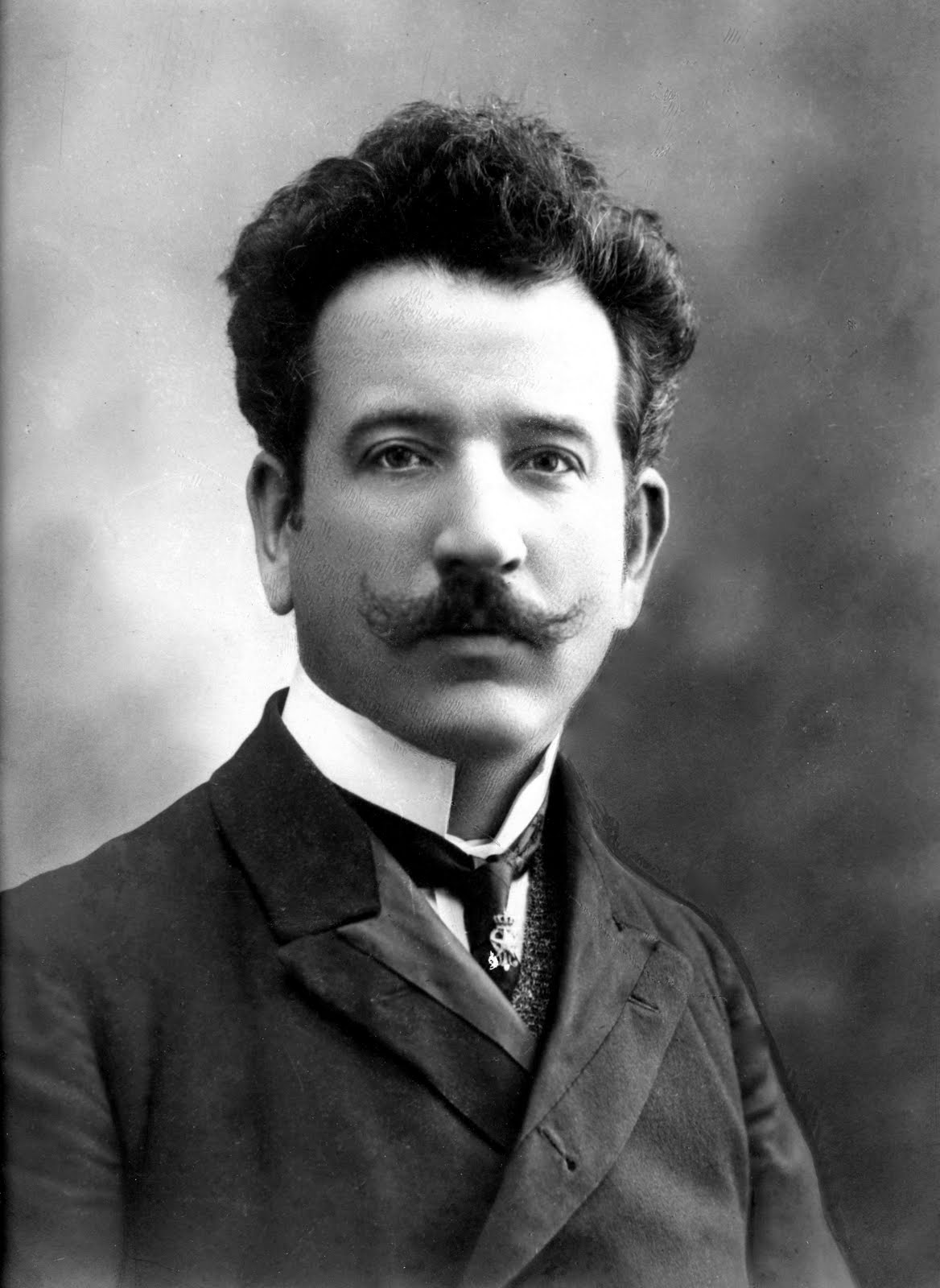 Marco Enrico Bossi, 1905